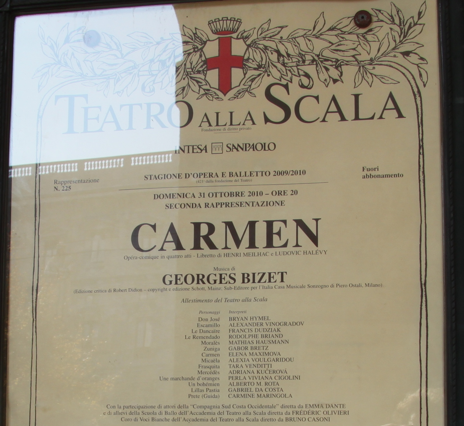 Афишный список театра La Scale